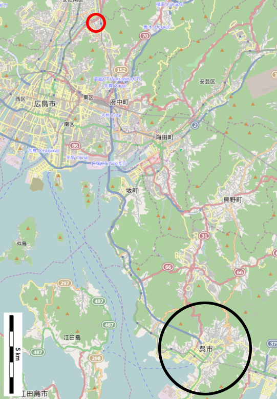 2015年現在の広島市東部から呉市にかけての地図。 This map may be incomplete, and may contain errors. Don't rely solely on it for navigation.